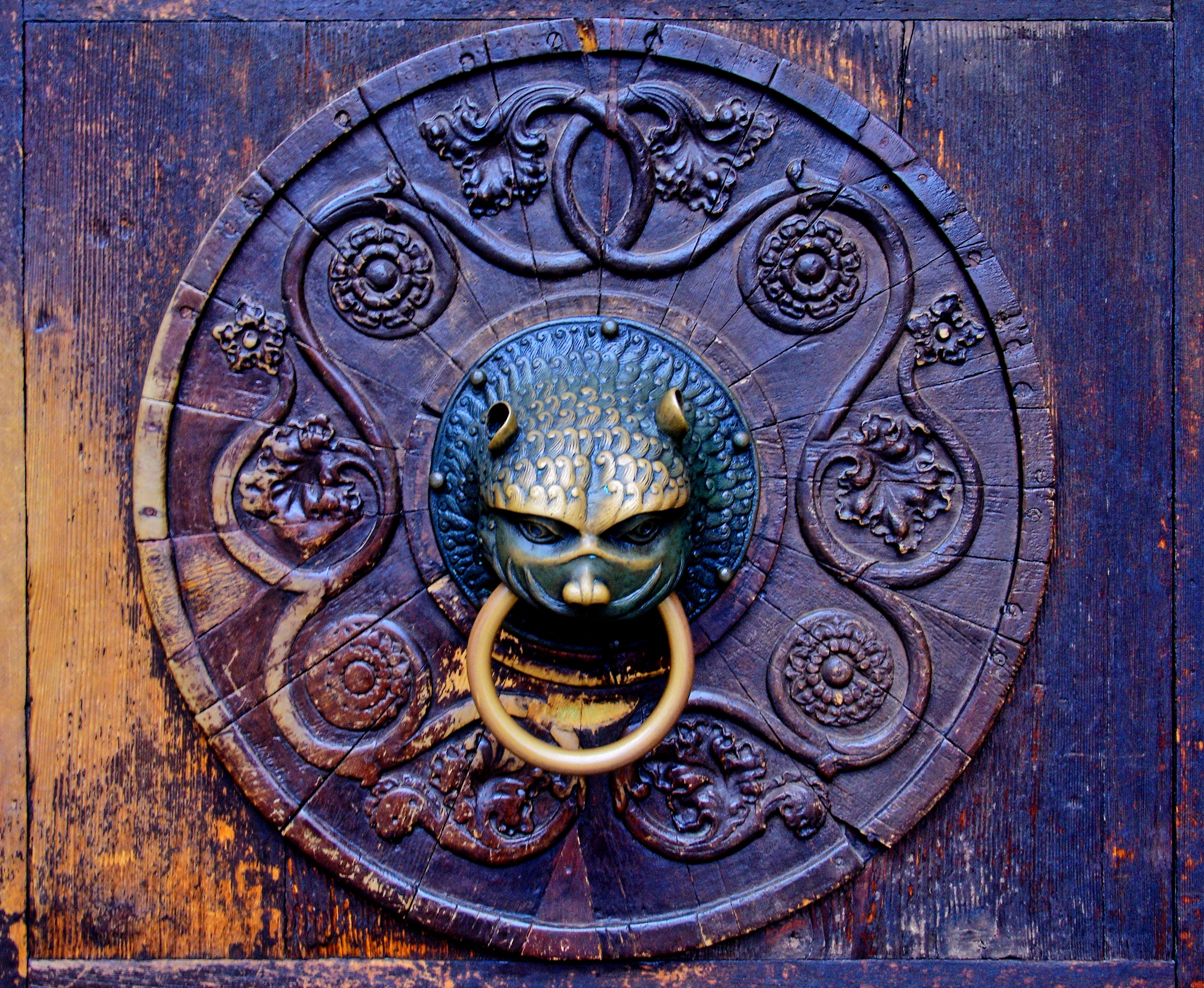 Bilder von dem Augsburger Dom. Das Südportal